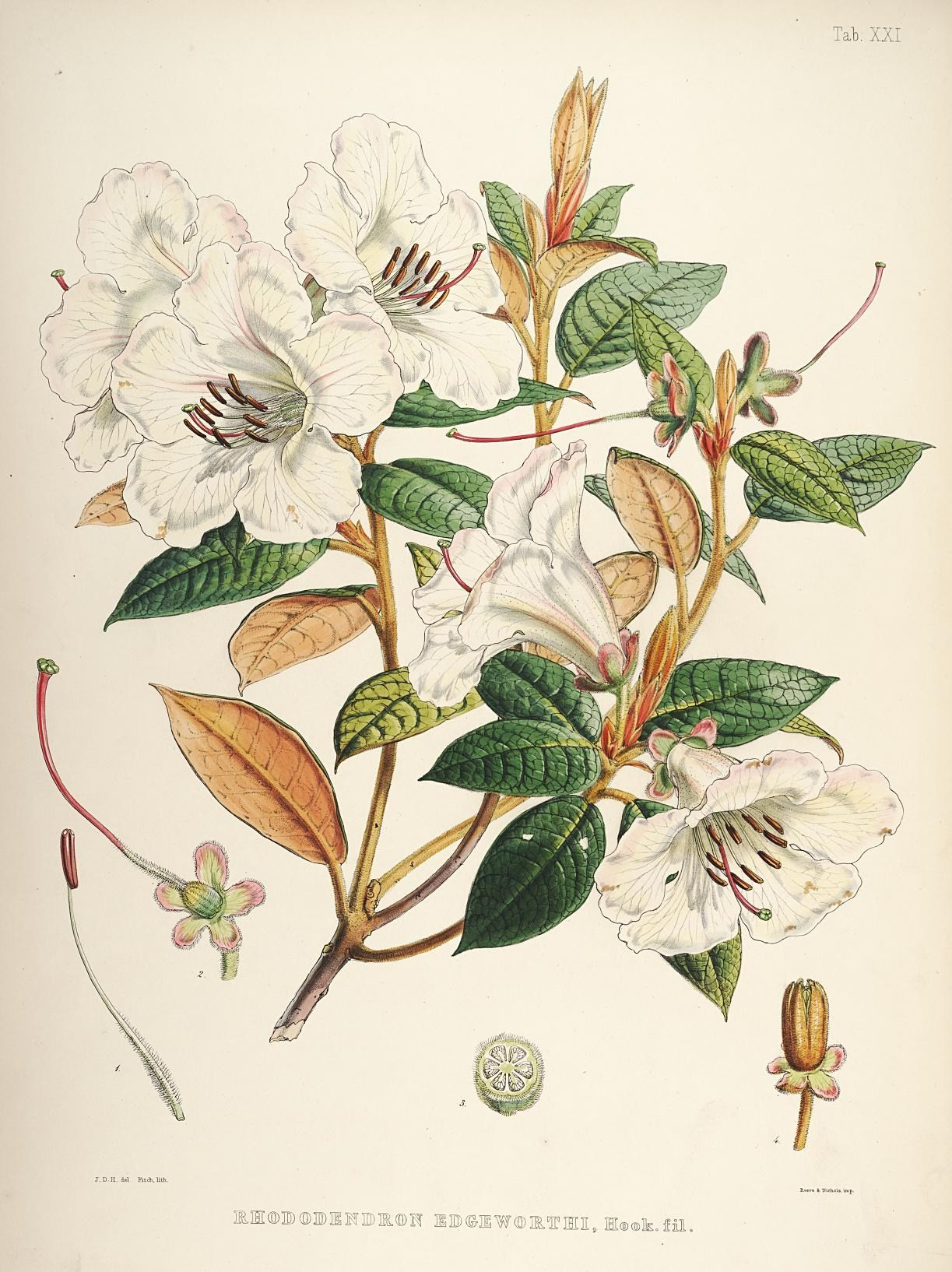 \ J.D.H. del FitcXlitti. S,tevQ fc Nichols iim L\^m BE 15^ ti 1 IRTME, M®® o